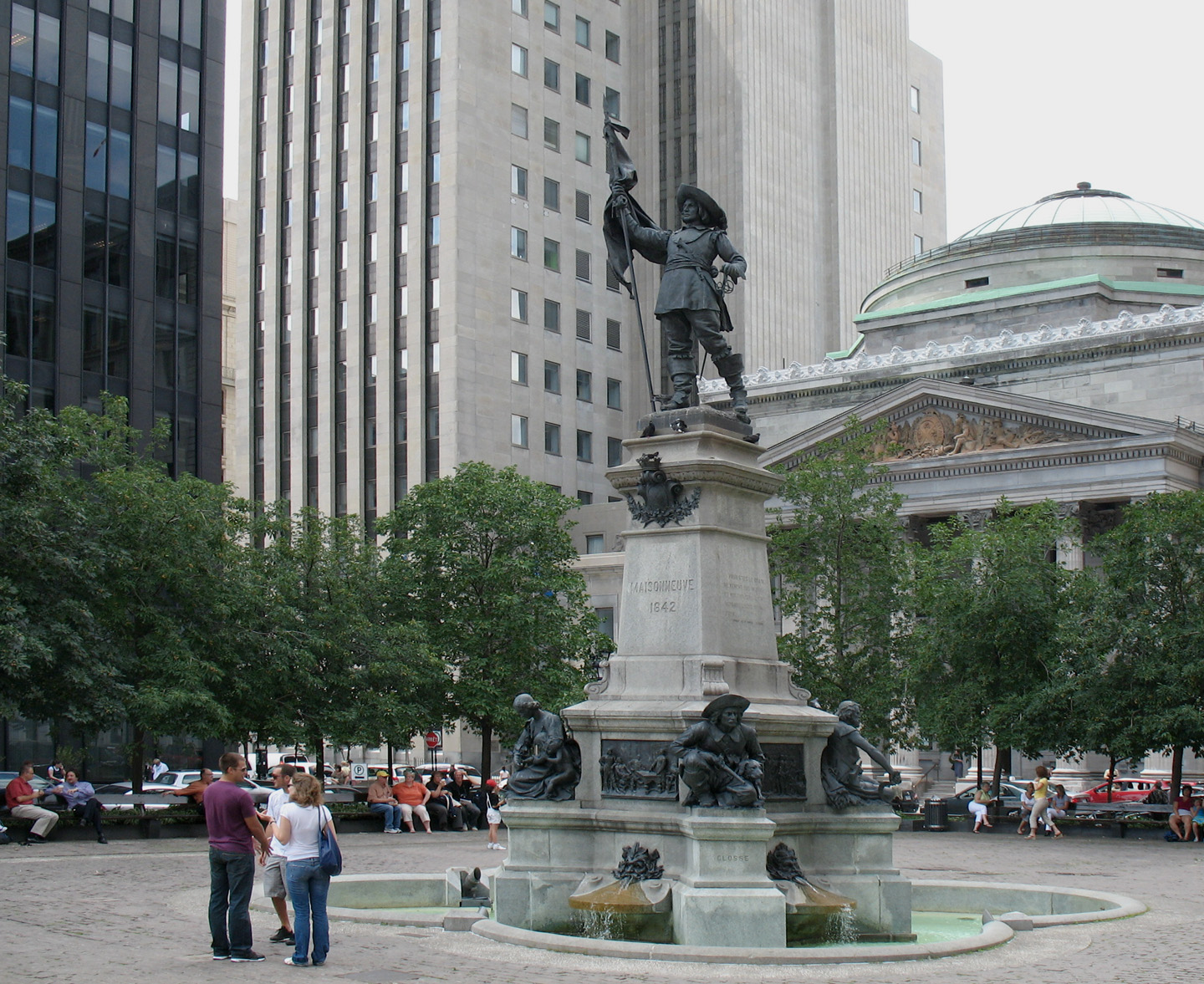 Place d'Armes, Montréal, Canada. La Place d’Armes, au centre duquel se trouve le monument d’un des fondateurs de la ville – Maisonneuve – est un lieu historique important.